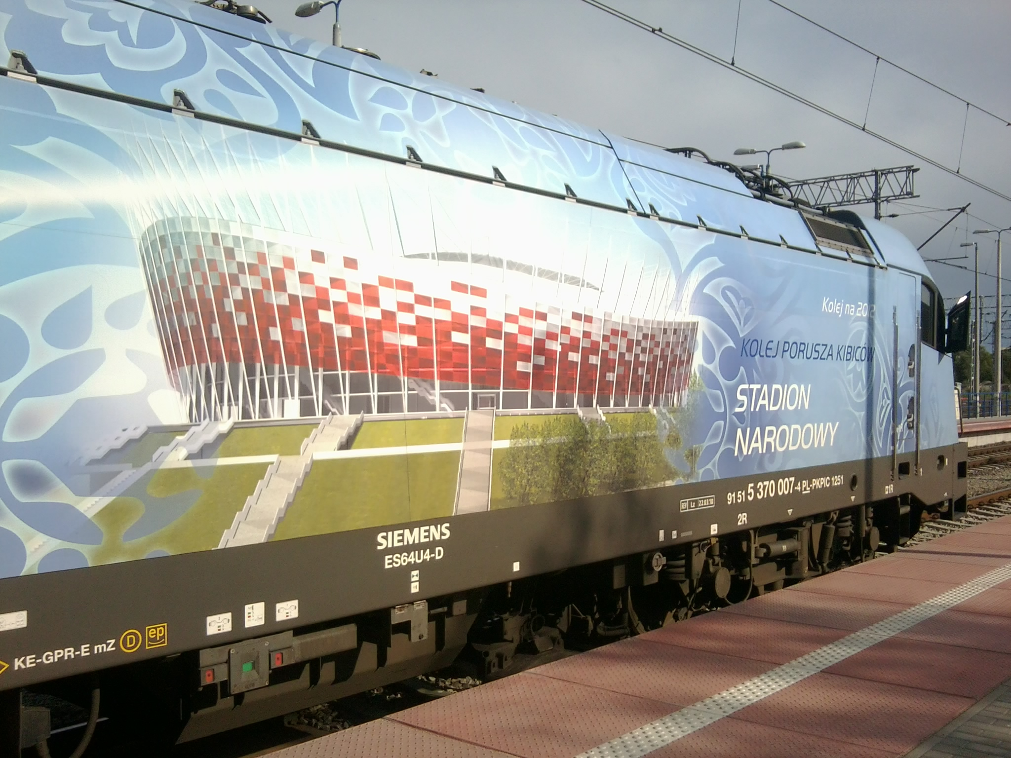 Jedna z polskich aren na których będą rozgrywane mecze EURO 2012, tu Stadion Narodowy w Warszawie.